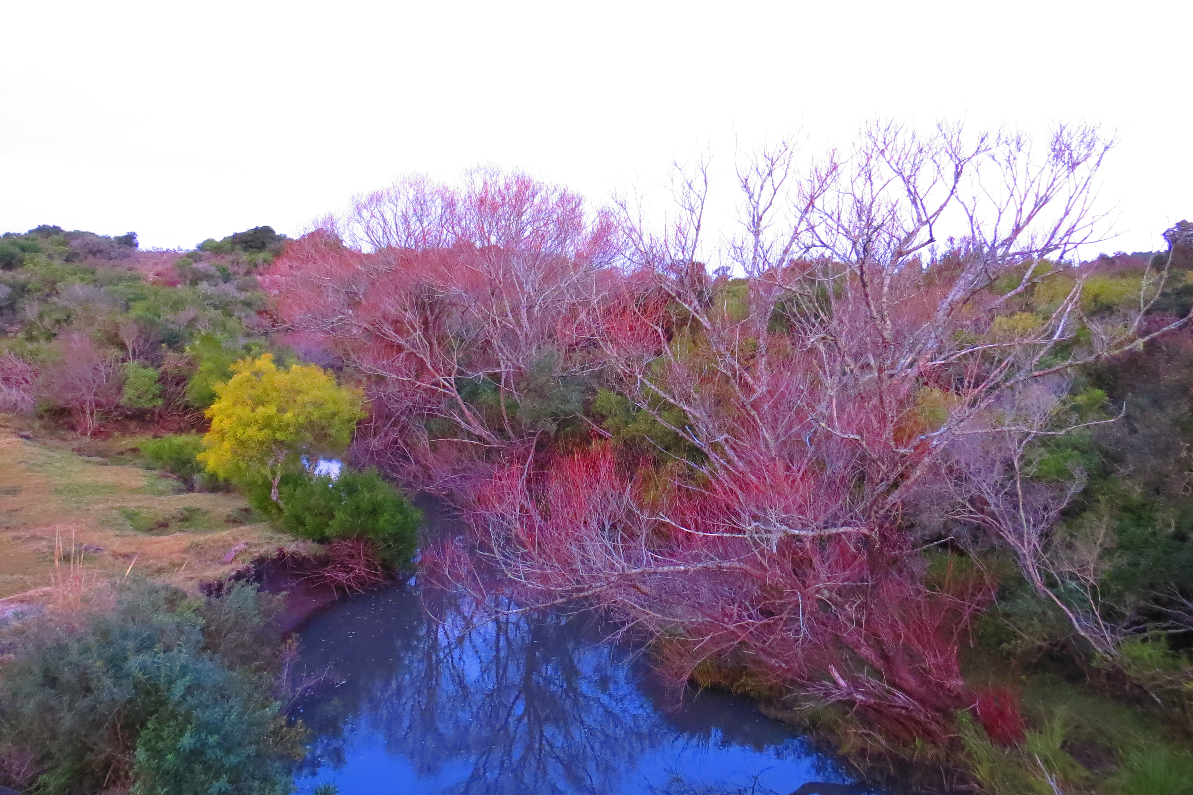 Arroyo Pan de Azúcar en Nueva Carrara, Maldonado Uruguay